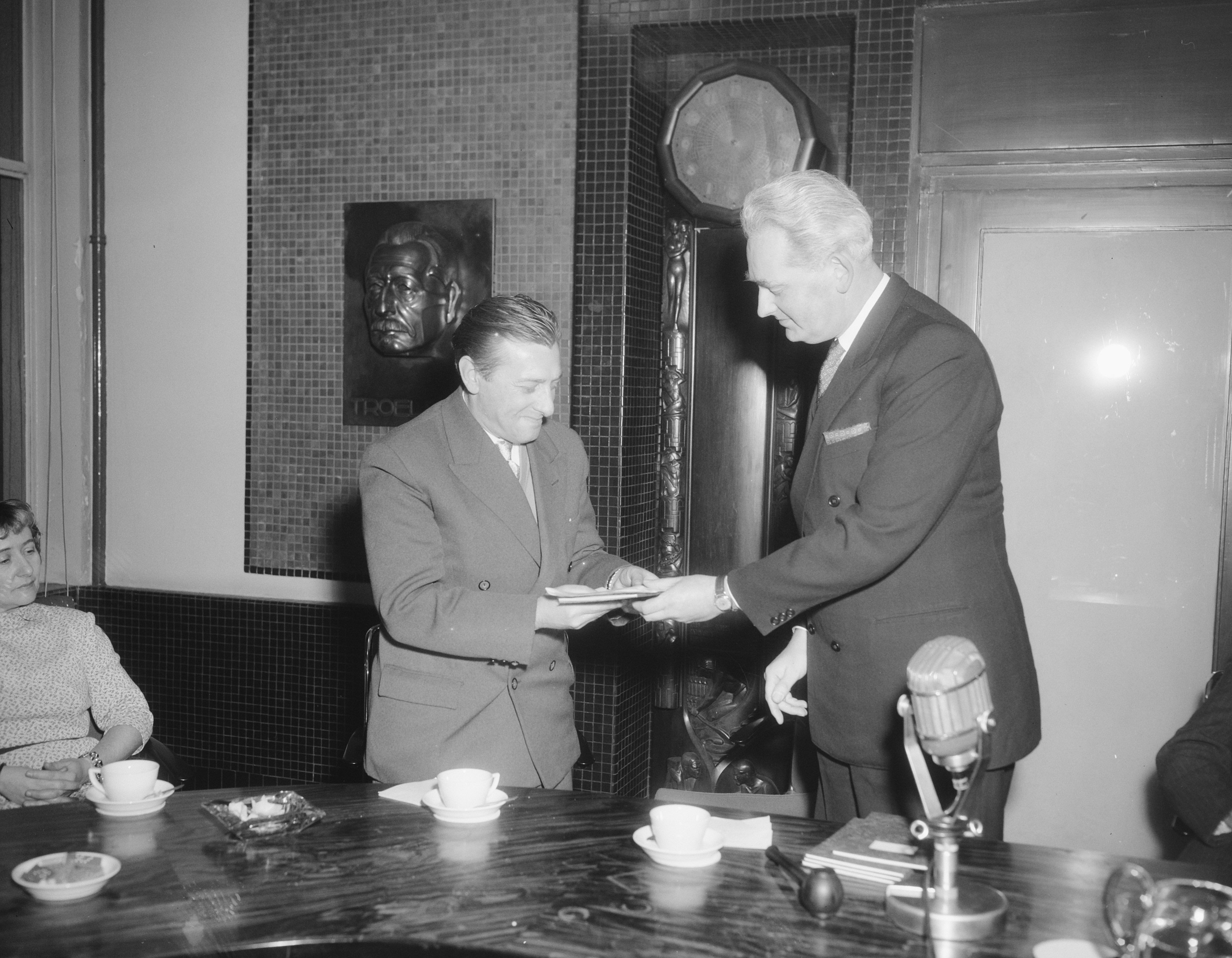 Uitreiking Henriette Roland Holstprijs te Amsterdam door Professor Garmt Stuiveling aan Louis Paul Boon. Bronze plaque with head of Troelstra in the background left. Date: 21 november 1957